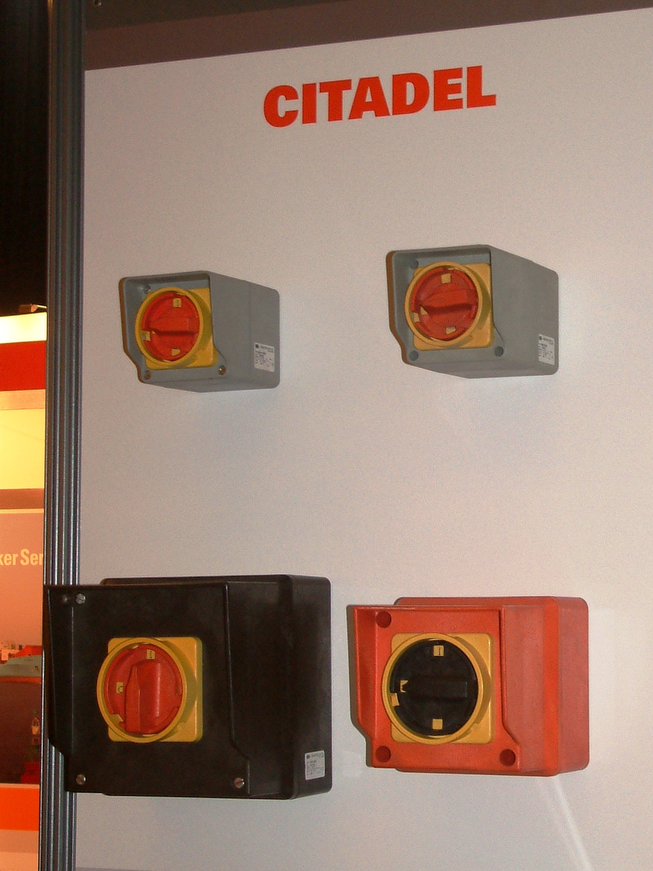 Europort 2009